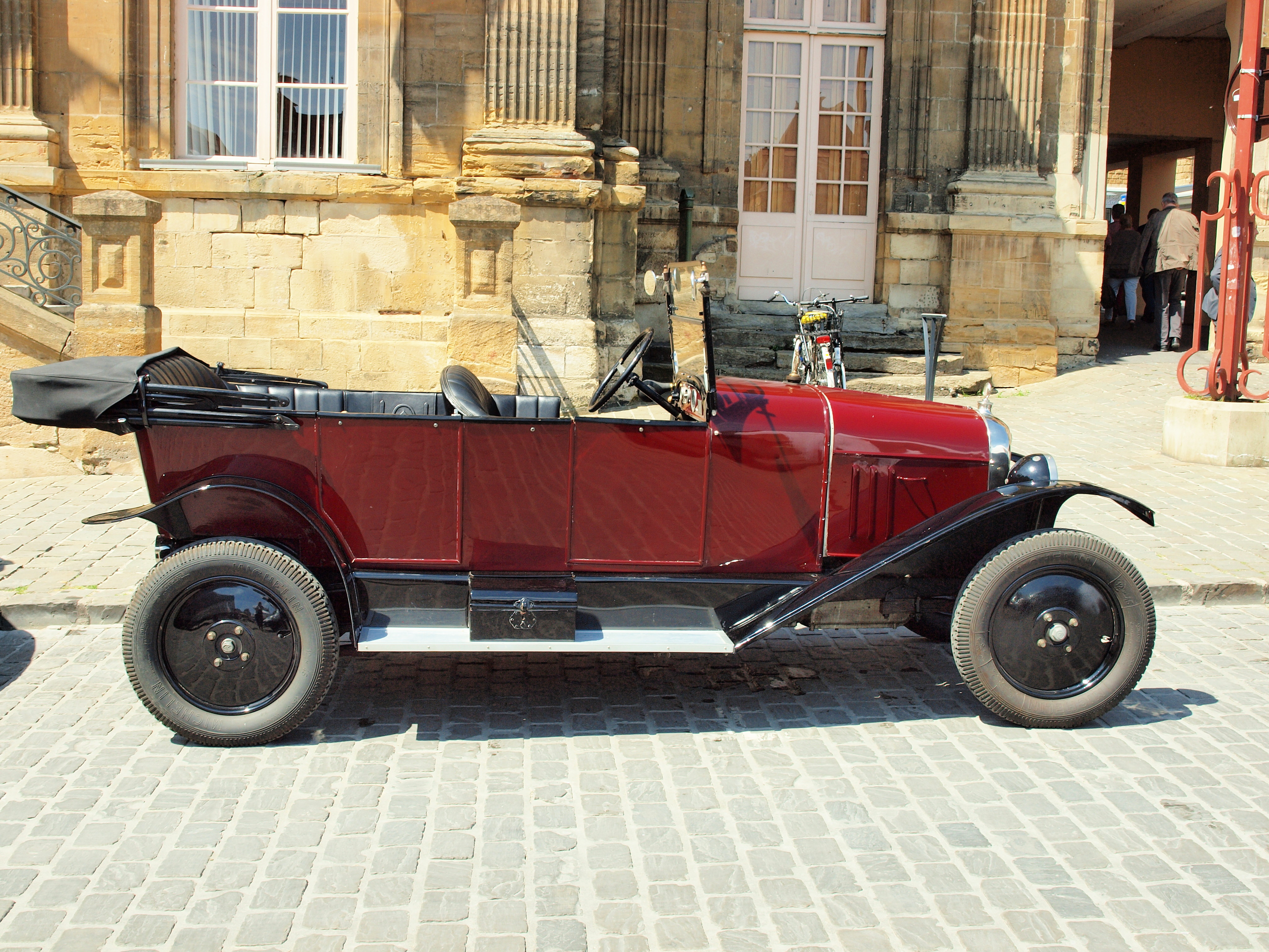 Place Ducale de Charleville-Mézières (Ardennes, France) , en mai 2016, lors du 13e festival des Confréries en Ardenne.